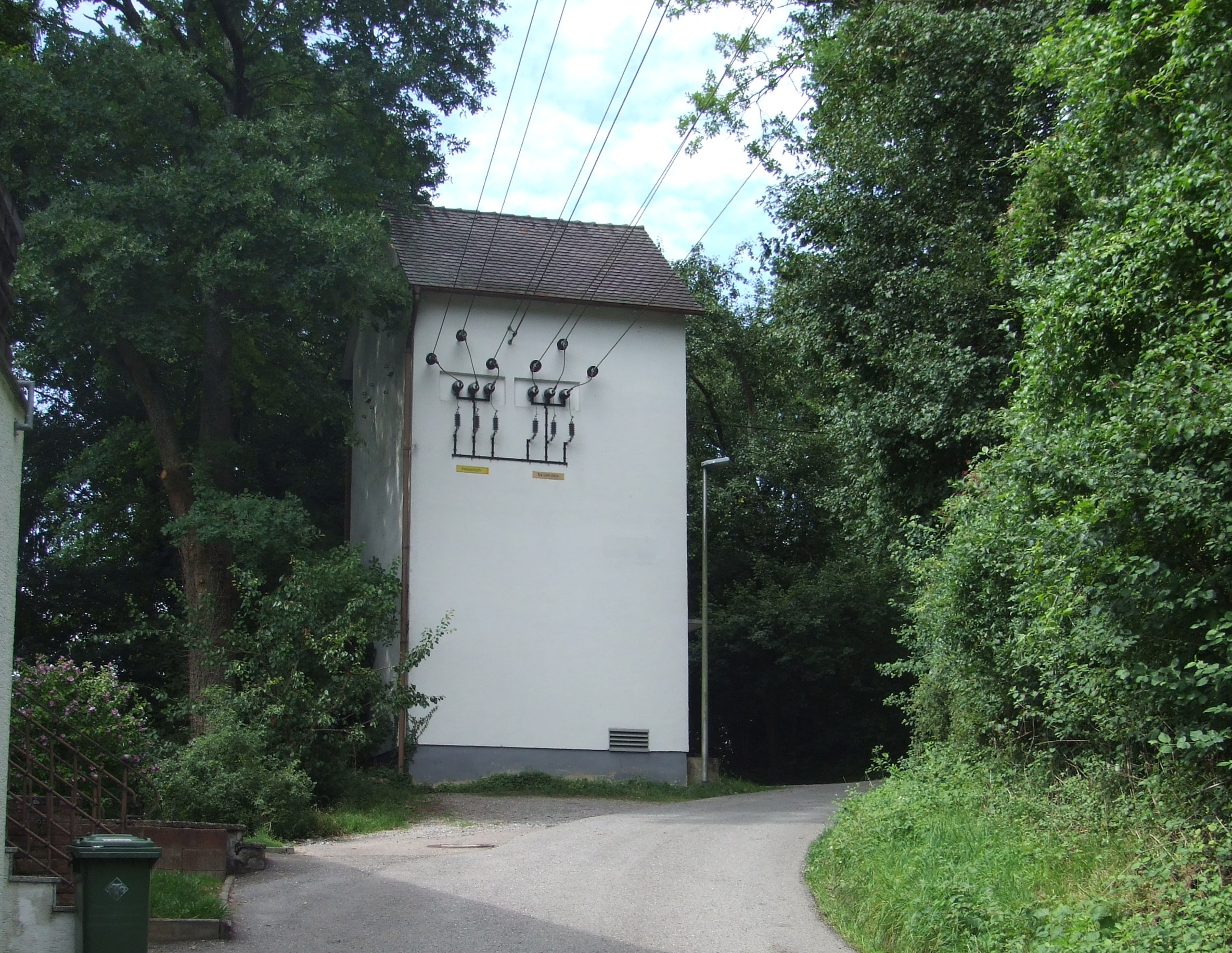 Letztes der ursprünglichen mit Ziegeldach versehenen Trafogebäude in Eschelbronn, Hetzenloch